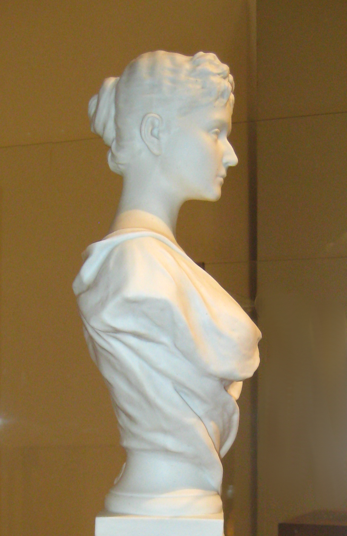 "Портрет императрицы Александры Федоровны". 1896. Марк Антокольский. ГТГ Уменьшенное повторение портрета, выполненного в мраморе в 1896 году.